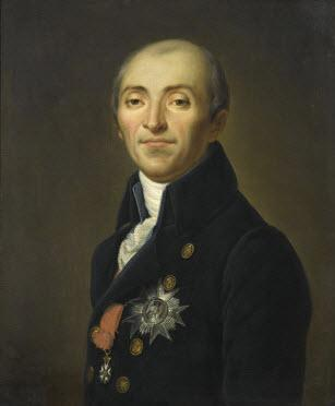 Portrait de Bernard Germain de Lacépède, naturaliste, membre de l'Institut en 1795 - Premier Grand Chancelier de la Légion d'honneur le 14 septembre 1803 - Président du Sénat conservateur